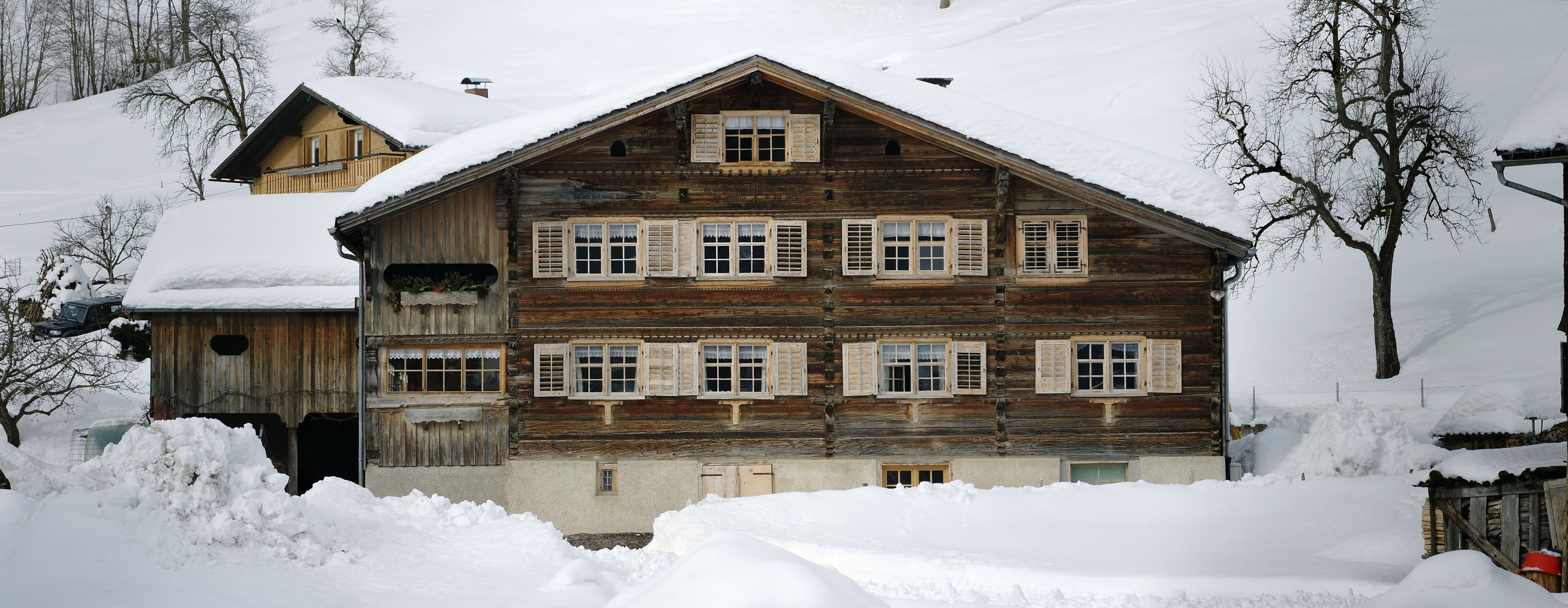 aus dem DEHIO Vorarlberg 1983: Einhof, Wohnteil bezeichnet Maister Joseph Feurstein 1763, 2geschossiger gestrickter Blockbau auf hohem Kellersockel mit flachgeneigtem Satteldach und Schopf, Giebelseite über den Sohlbalken und Sturtzbalken leicht vorkragend, Gesimse mit Zierfriesen, unter den Erdgeschoßfenstern Zierkonsolen mit figuralen Motiven; Pfettenköpfe profiliert mit Fratzen. Im Loch Nr.266 in Schwarzenberg, Vorarlberg.